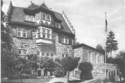 Haus der Landsmannschaft Schottland, Ansicht vom Garten